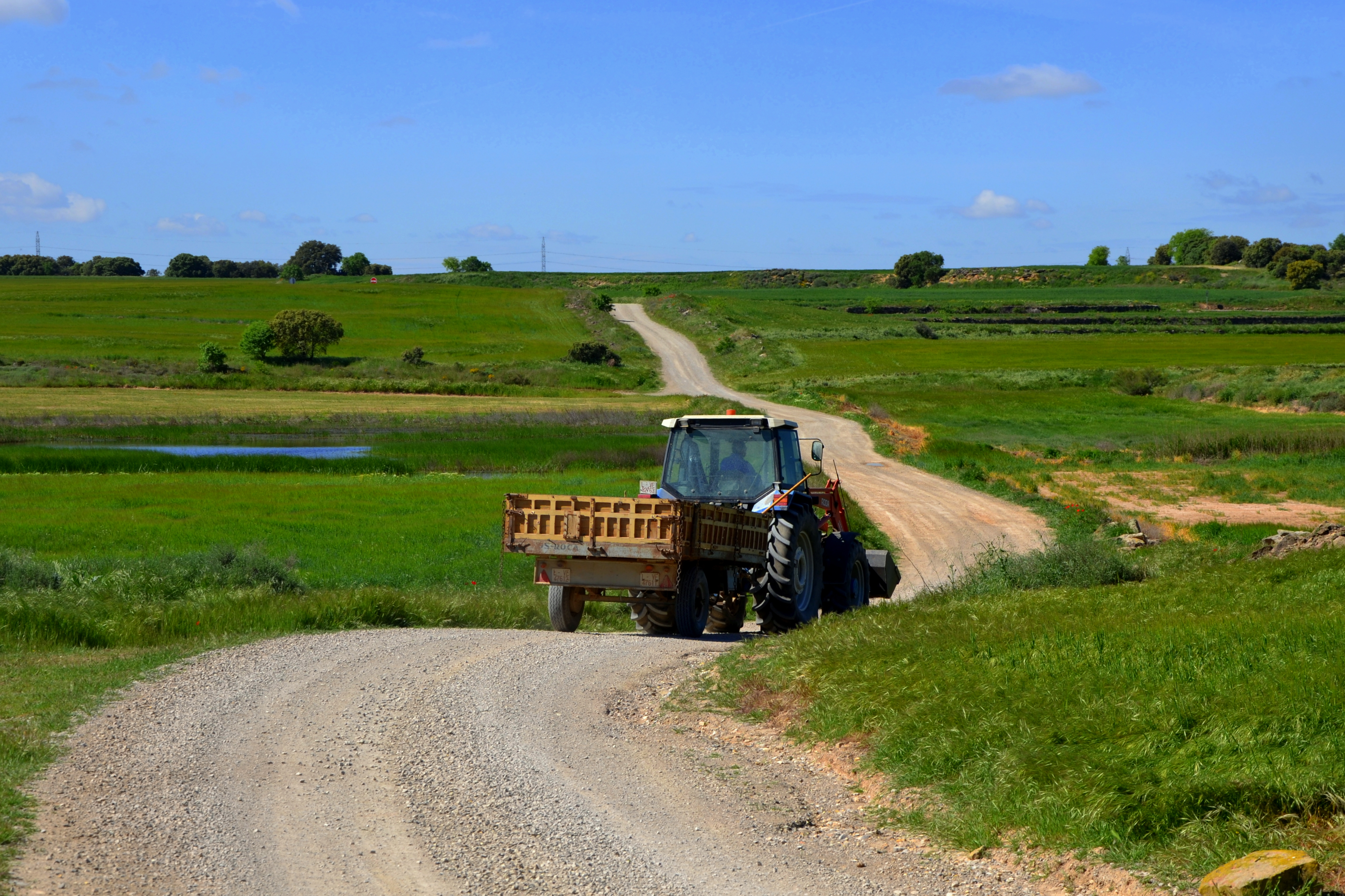 Plans de SiÃ³ This is a a photo of a natural area in Catalonia, Spain, with id: ES510256